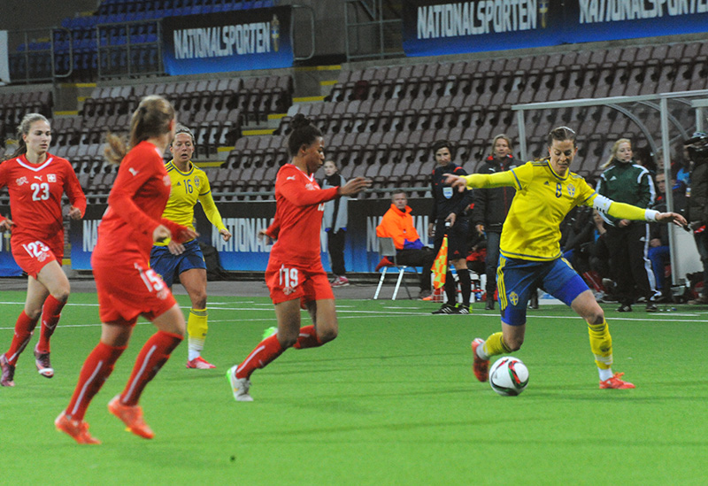 a_81_0976